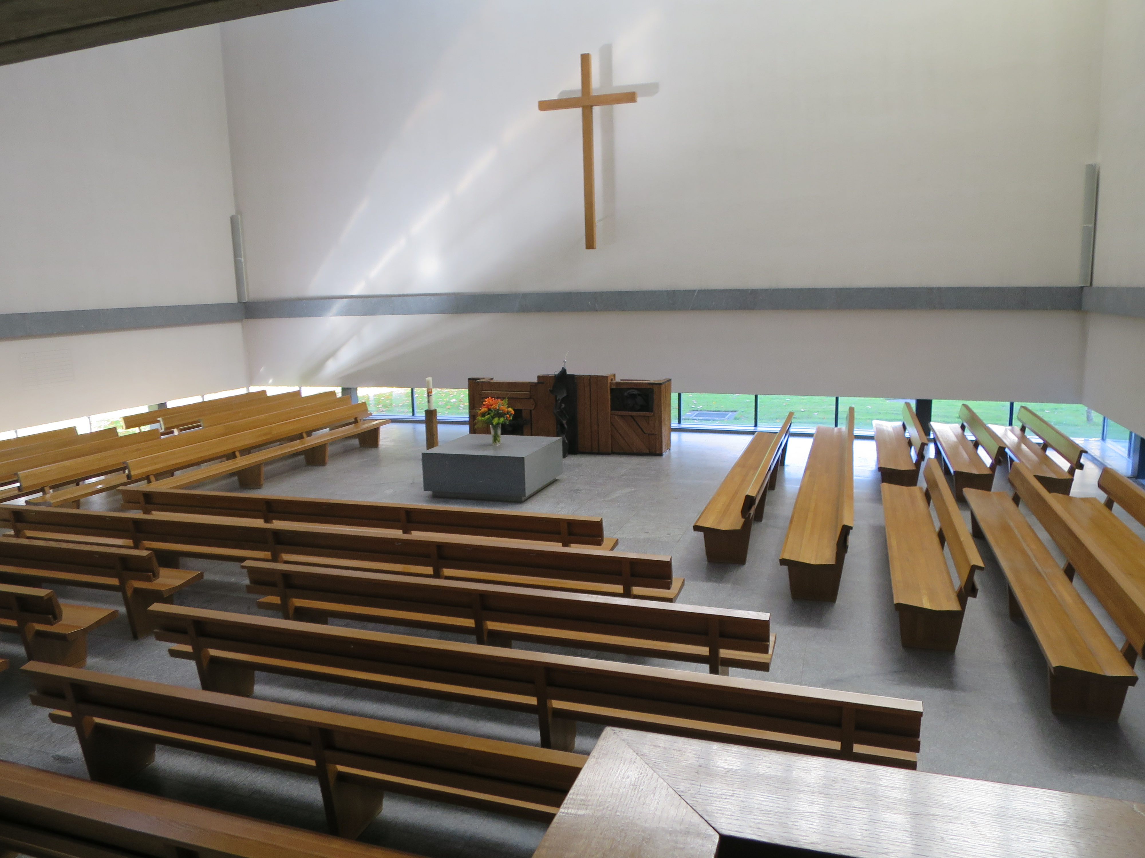 Reformierte Andreaskirche Zürich-Sihlfeld (Monolith) - Innenraum